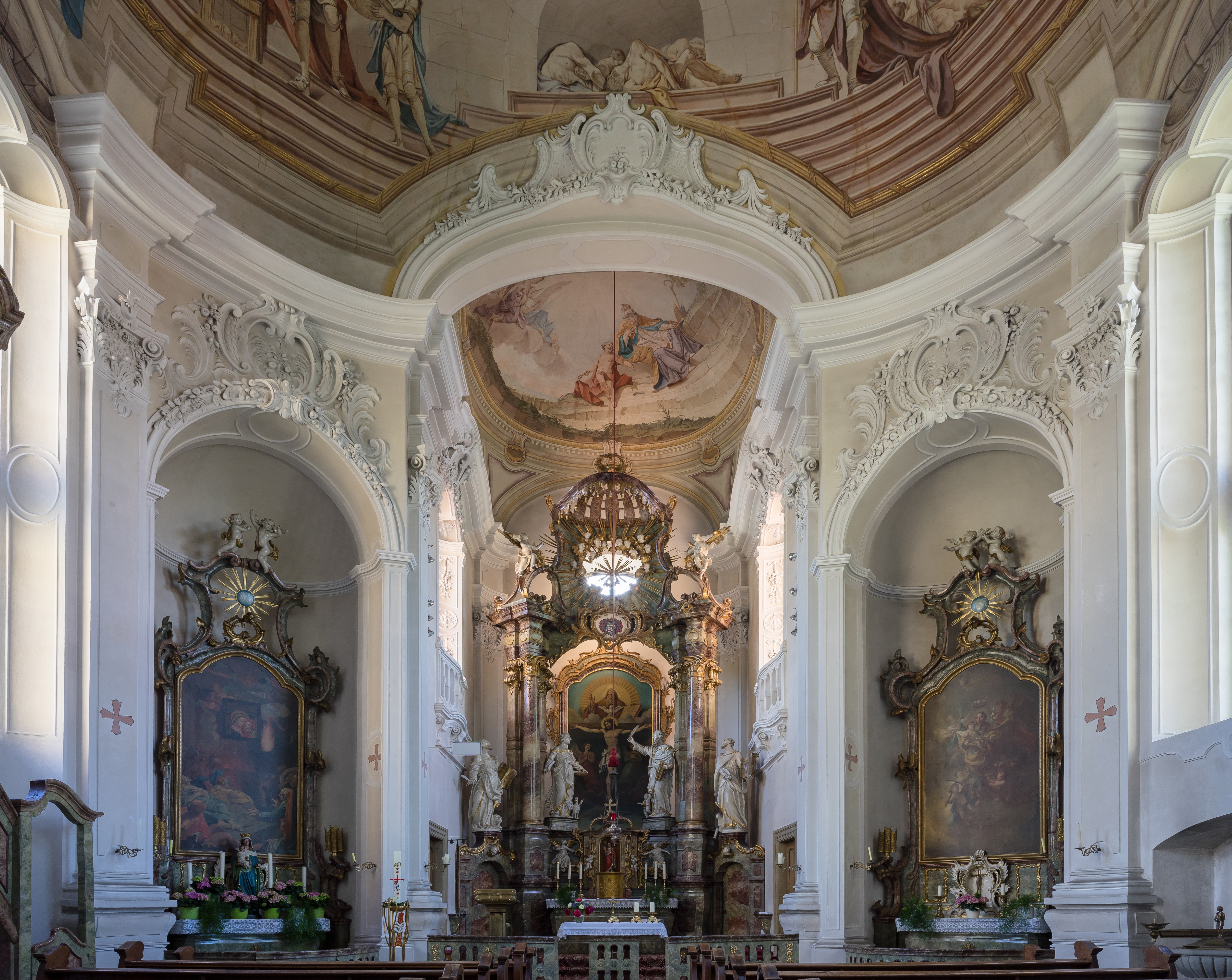 Dörzbach (Hohenlohekreis), Ortsteil Meßbach: Dreifaltigkeitskirche, Rokoko-Stil, 1777 geweiht. Innenansicht mit Blick in Richtung auf den Hochaltar.